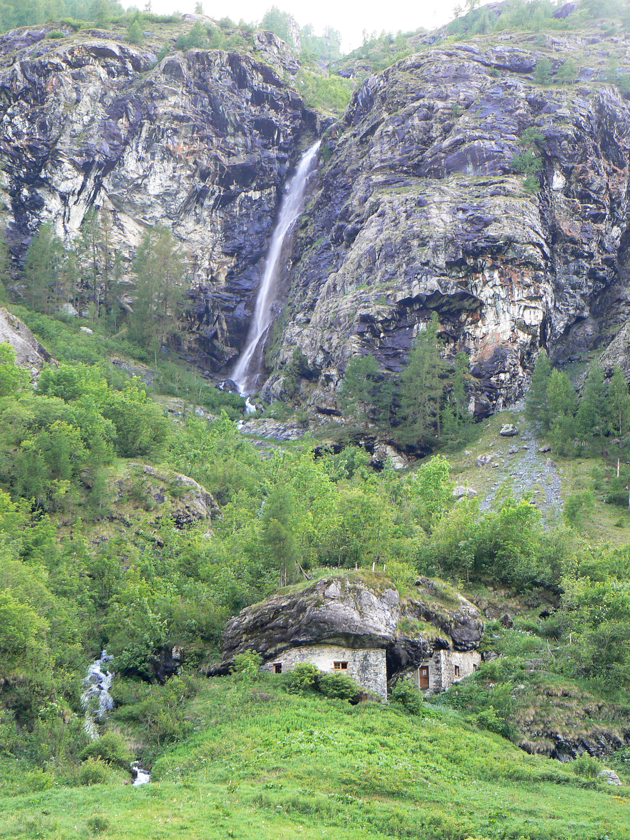 Baita di Binò Alpelté, Ecomuseo Walser, Gressoney-La-Trinité. Nella Valle del Lys sotto ad una cascata